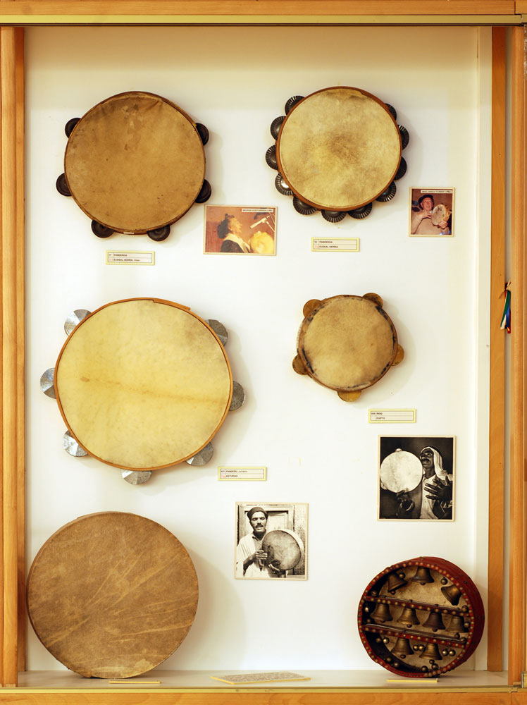 Larru bateko pandero borobilak [1] Soinuenea - Herri Musikaren Txokoa (Traditional Music Centre; former Documentation Center of Popular Music) Oiartzun, Gipuzkoa, Spain